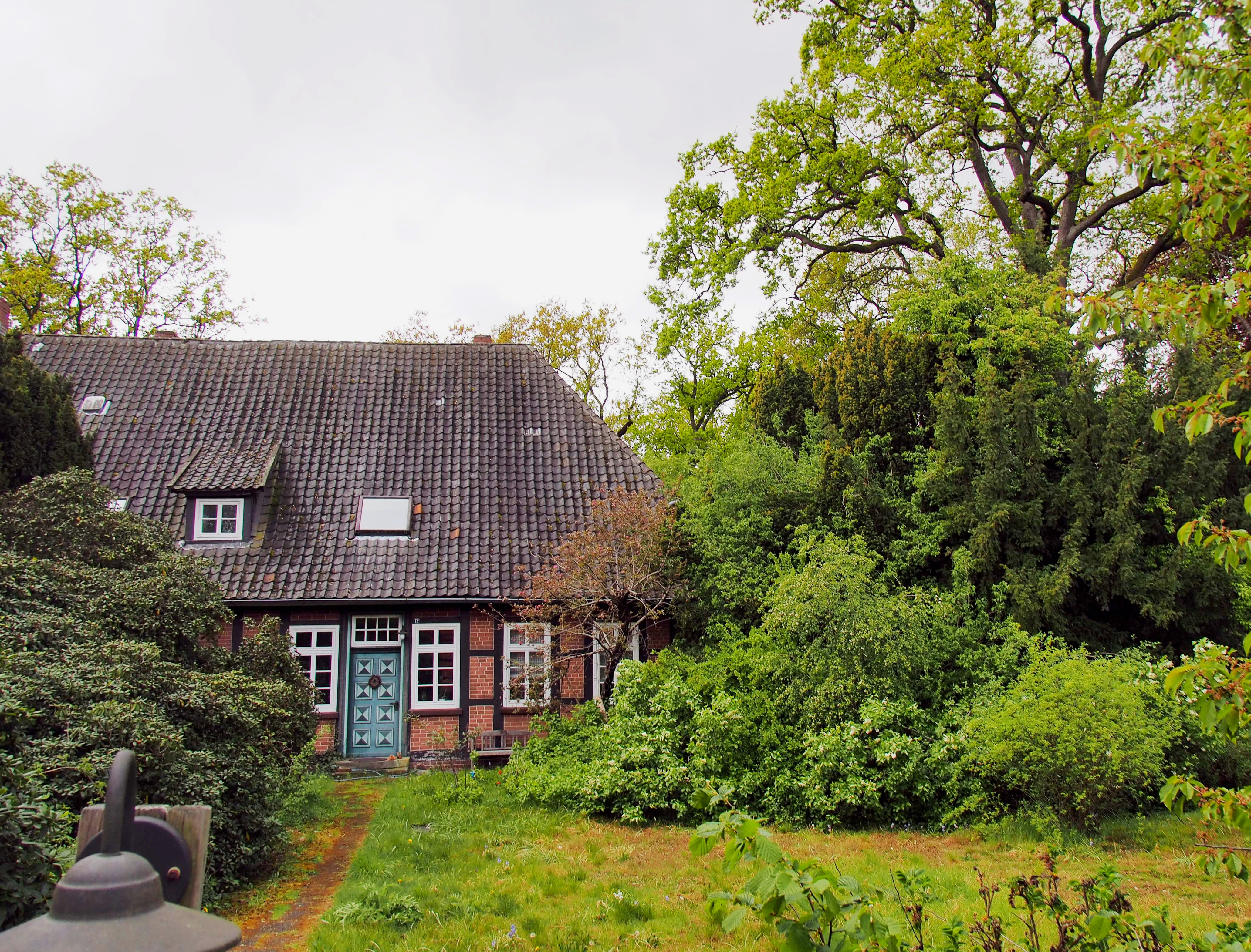 Ehemaliges Wohnhaus von Hans Piesker in Hermannsburg, Gemeinde Südheide, Niedersachsen